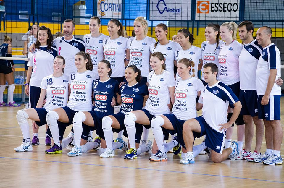 Stagione 2013-14